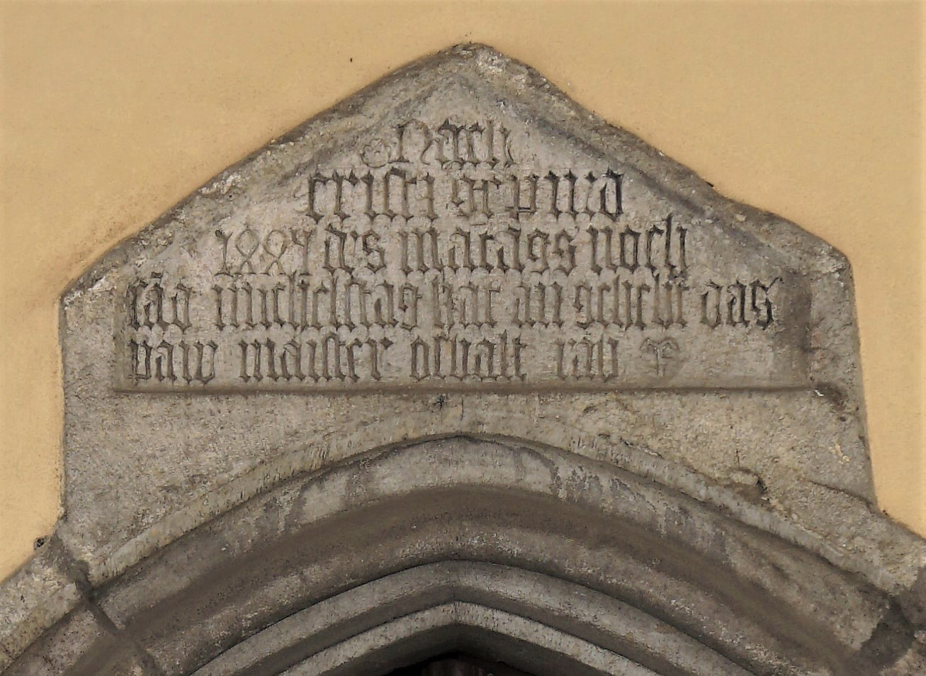 Pfarrkirche St. Peter und Paul (Tarvis), Steinplatte mit Gründungsjahr 1445